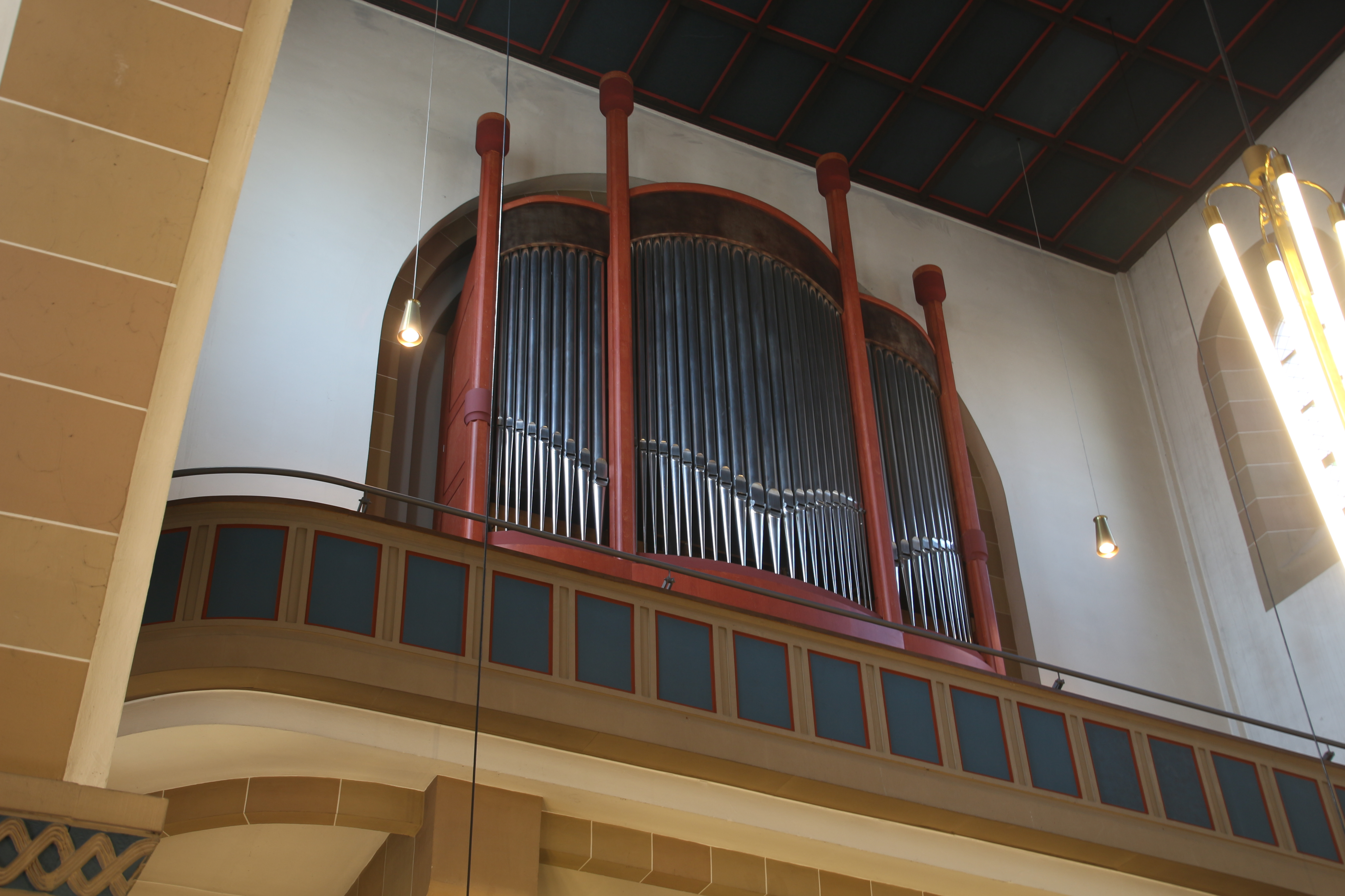 Siehe Bild und Dateiname